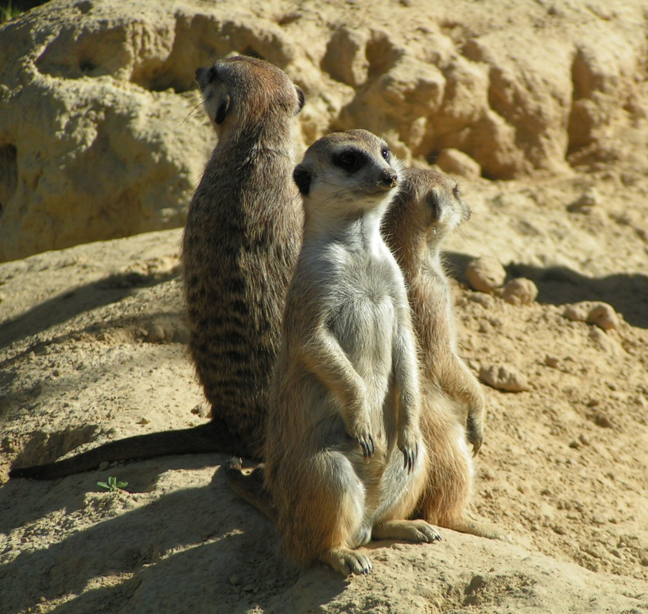 Сурикати, снимани в зоопарка в Кьолн. © 2004 Borislav Manolov